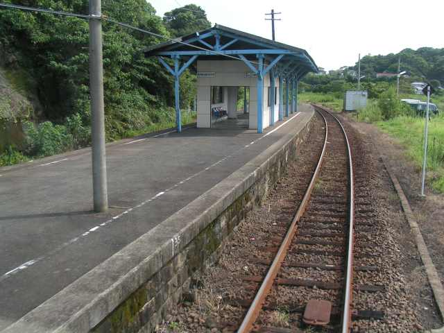 相浦駅 投稿者が撮影(2006/08/28)